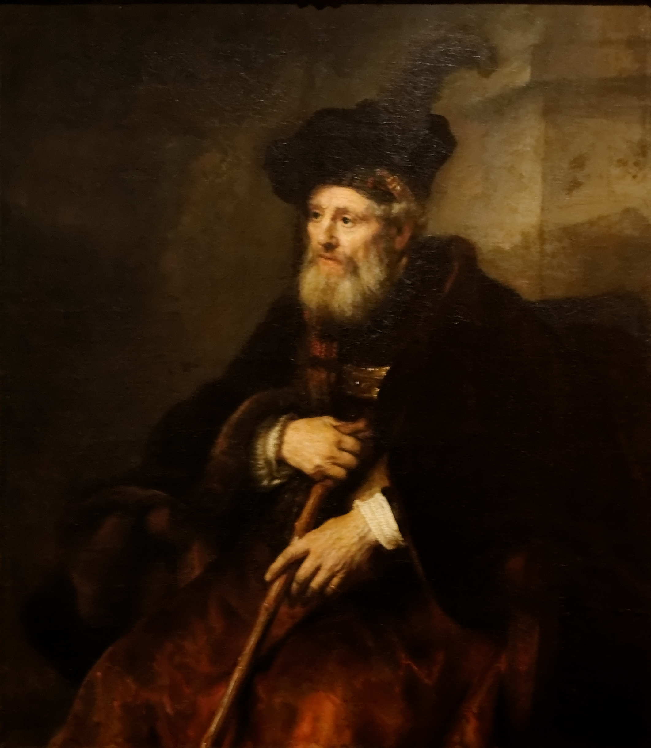 Portrait d'un vieil homme, Rembrandt 1645. Huile sur toile exposée au musée Calouste Gulbenkian, Lisbonne. Inv 1489